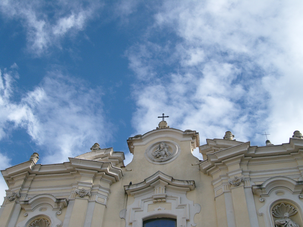 Particolare della facciata della Chiesa del Carmine di Cerignola (FG).